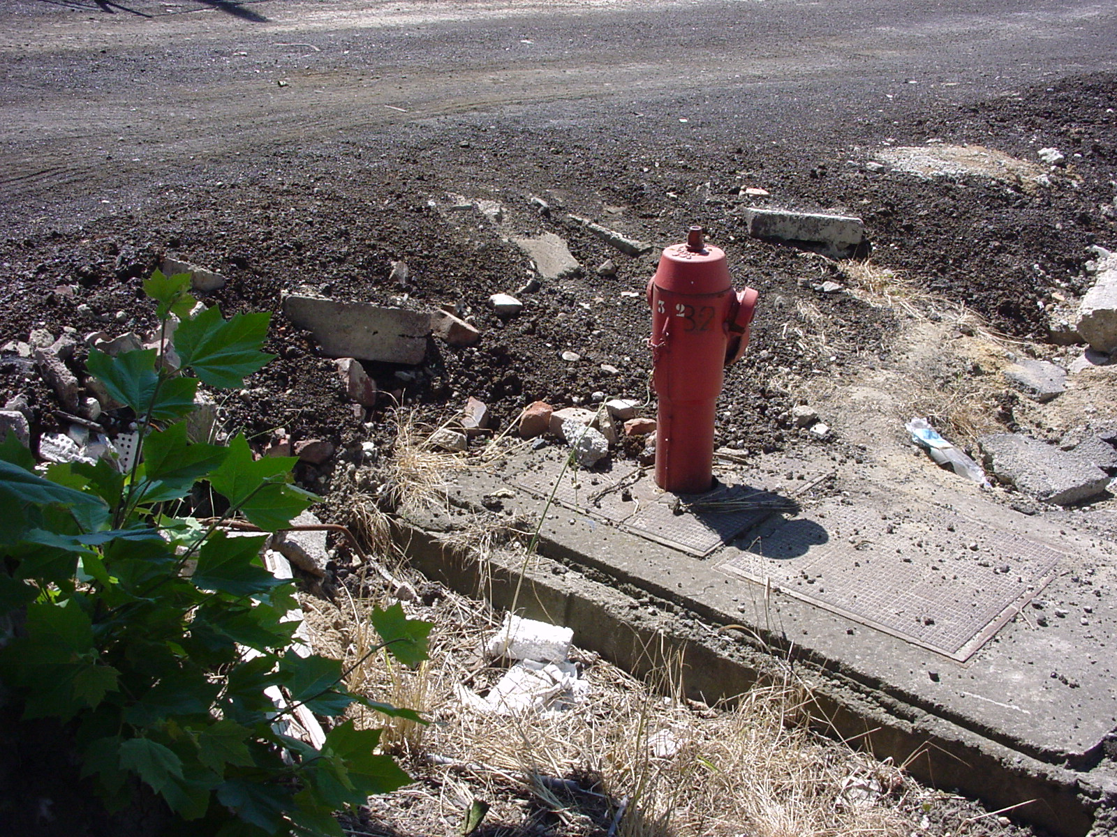 Mâchefer utilisé en fond de couche routière dans un lotissement (Arques, Pas de Calais, France)